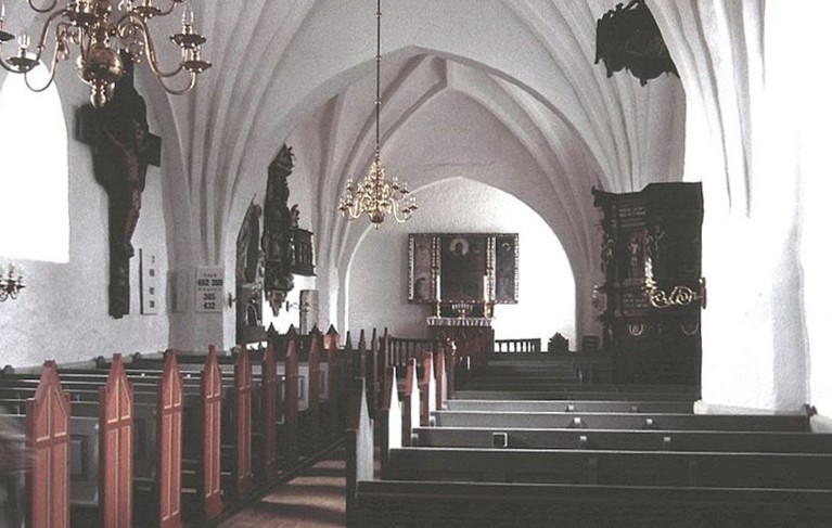 Vrensted Kirke i Danmark. Skibet set mod øst